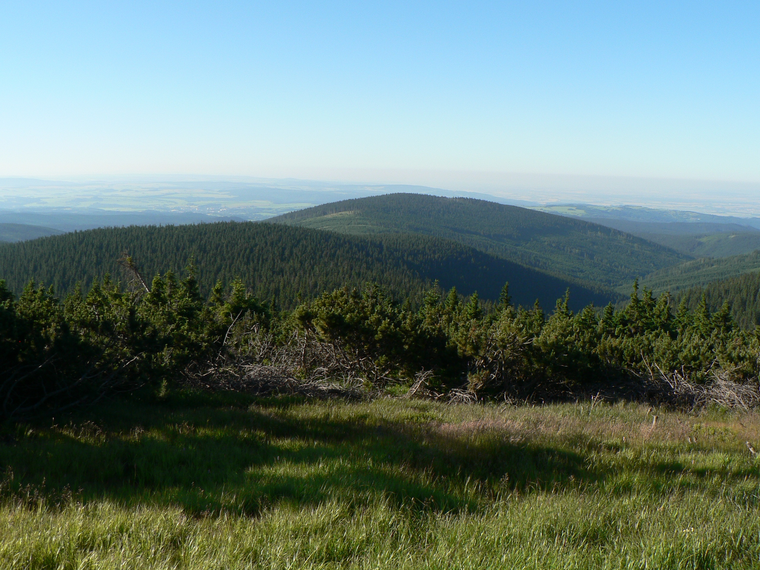 Pohled z Jelení studánky na Ostružnou, vlevo v popředí Jelenka.